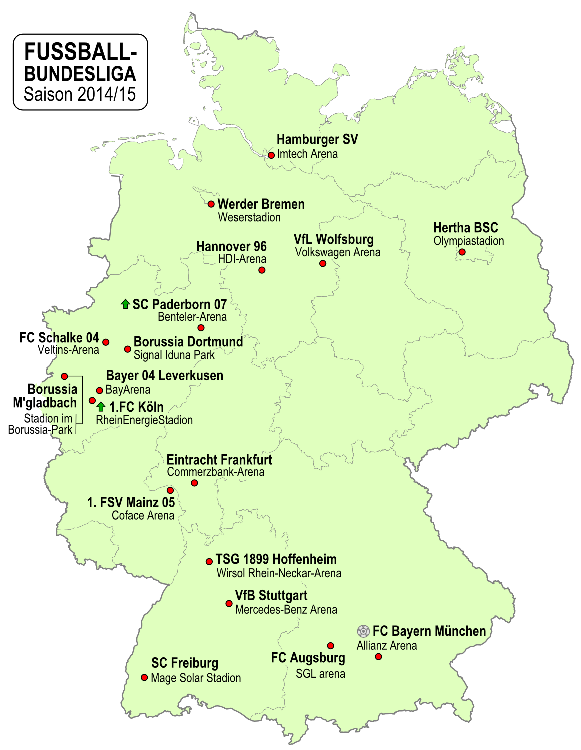 Karte der Vereine der Fußball-Bundesliga-Saison 2014/2015